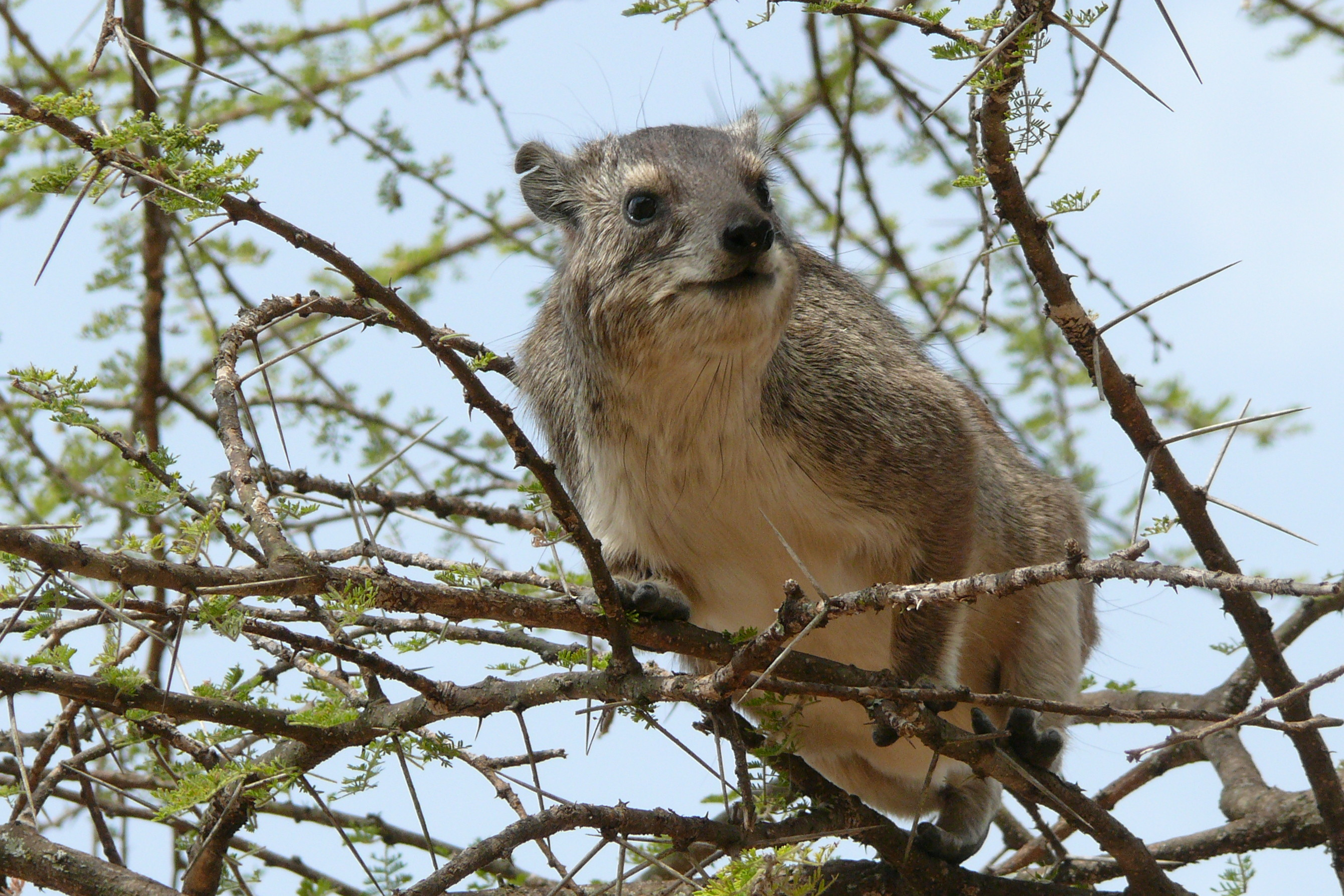 Buschschliefer (Heterohyrax brucei)